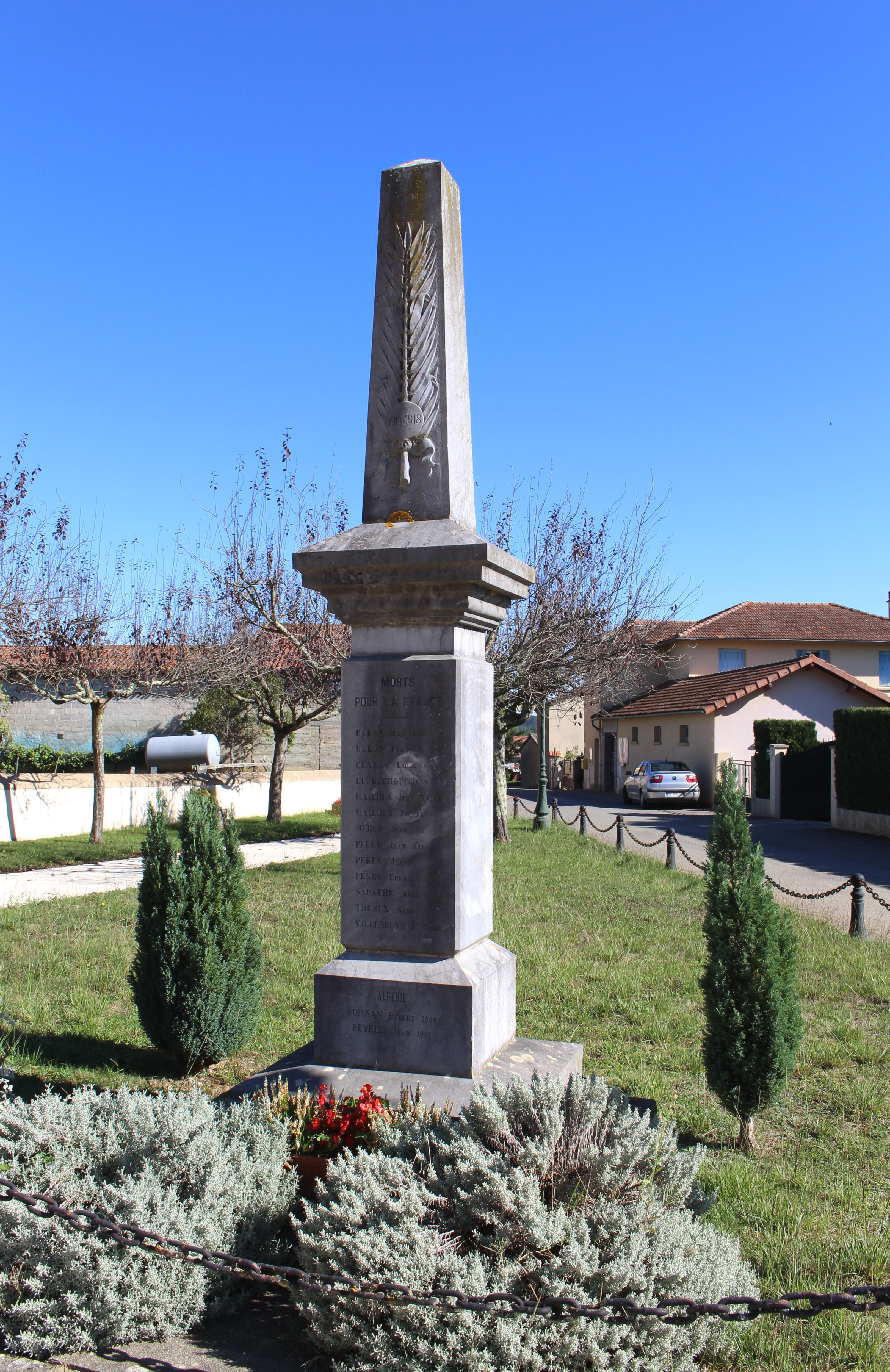 Monument aux morts de Mun (Hautes-Pyrénées)